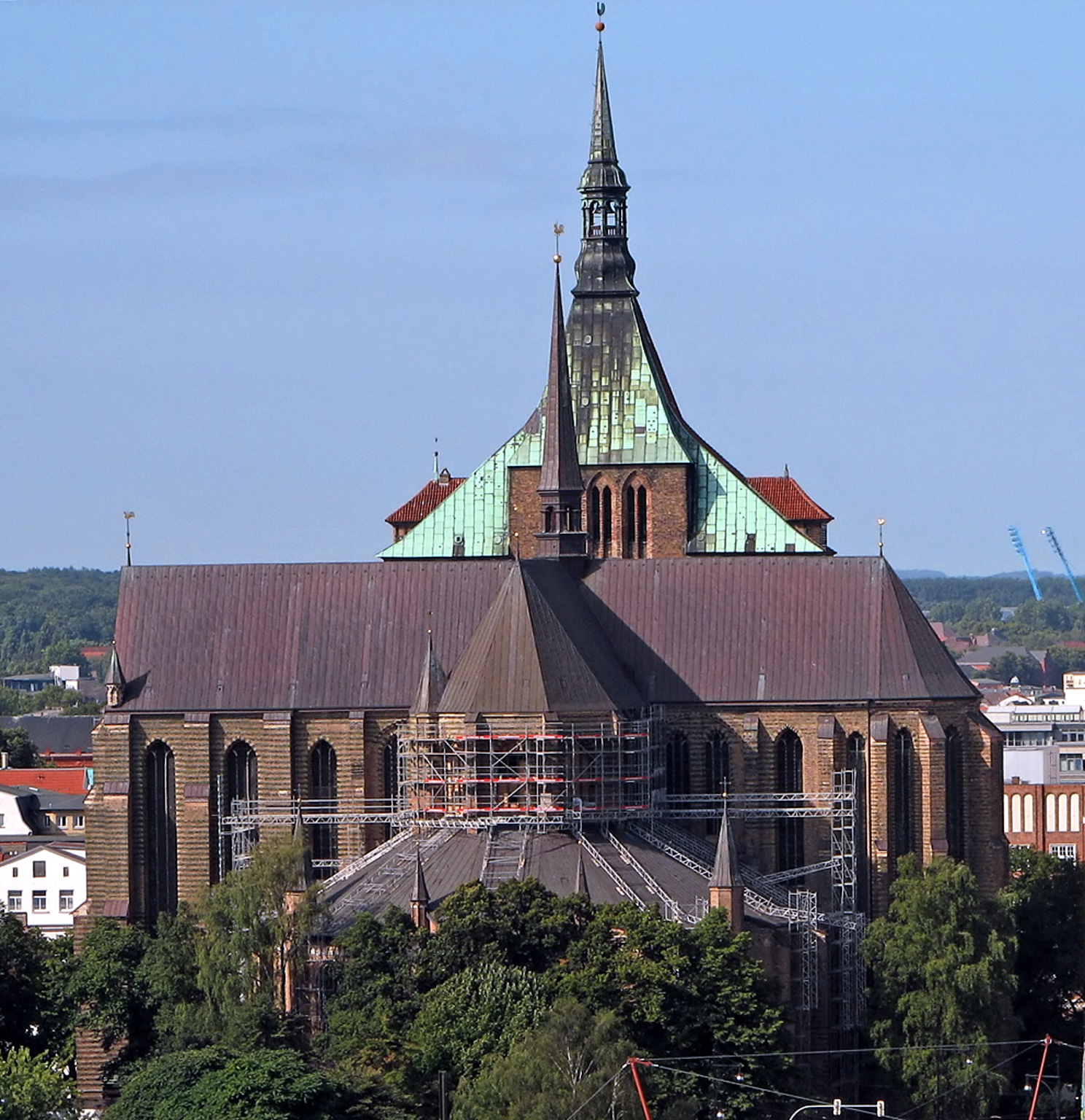 Beschreibung: Marienkirche (Sicht von St. Petri) in Rostock, Germany Fotograf: Darkone, 31. August 2005